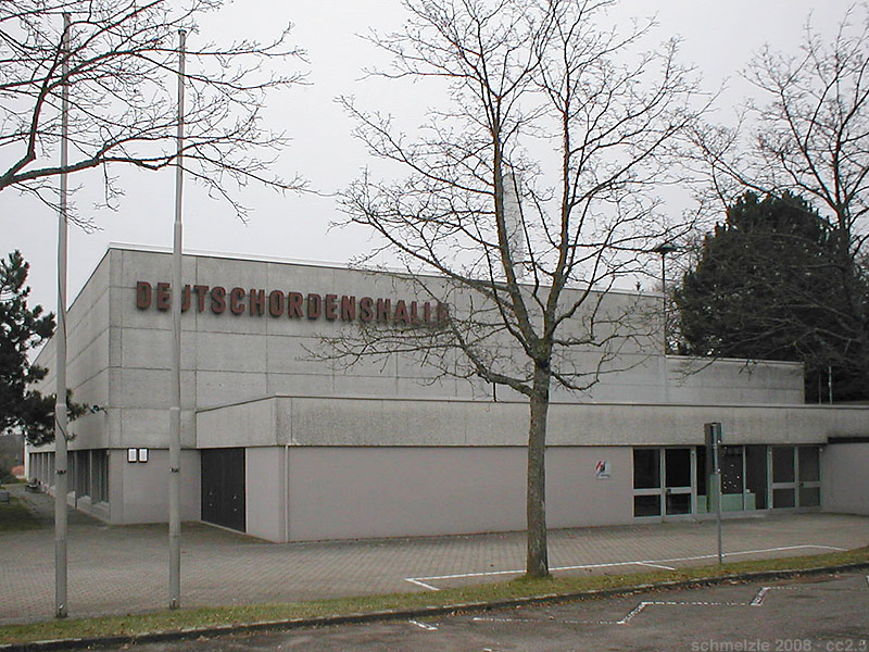 Deutschordenshalle im Kapellenweg 25 in Heilbronn-Kirchhausen